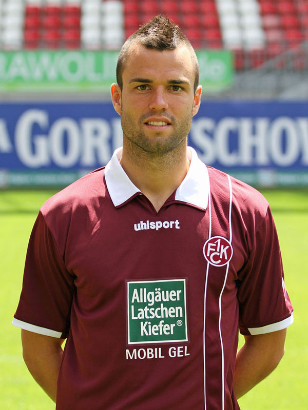 Bastian Schulz, Fußballspieler